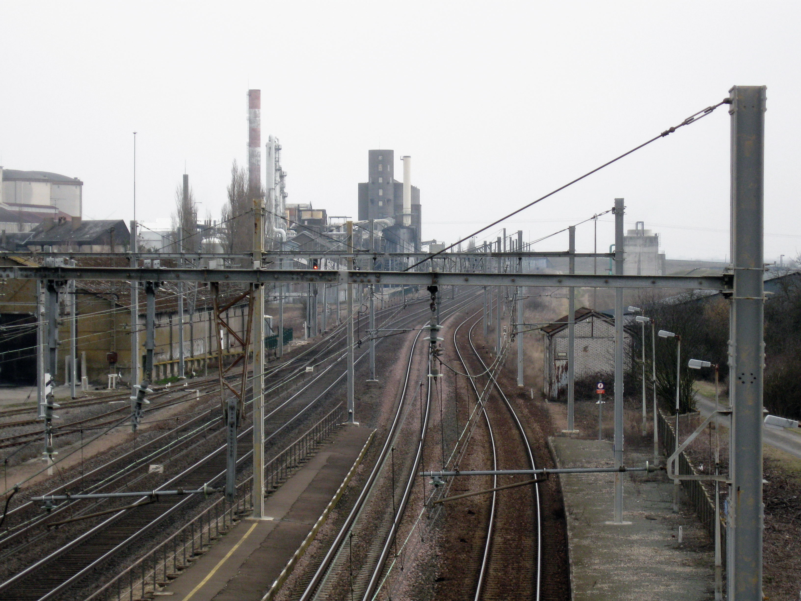 La gare et les voies en direction de Paris, au fond à gauche la sucrerie, Artenay, Loiret, France